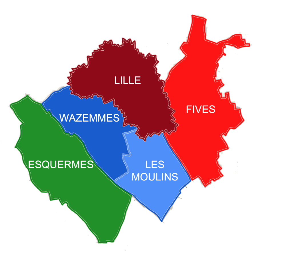 La carte représente les limites des quatre communes absorbées par Lille en 1858 : Wazemmes, Esquermes, Fives et Moulins.